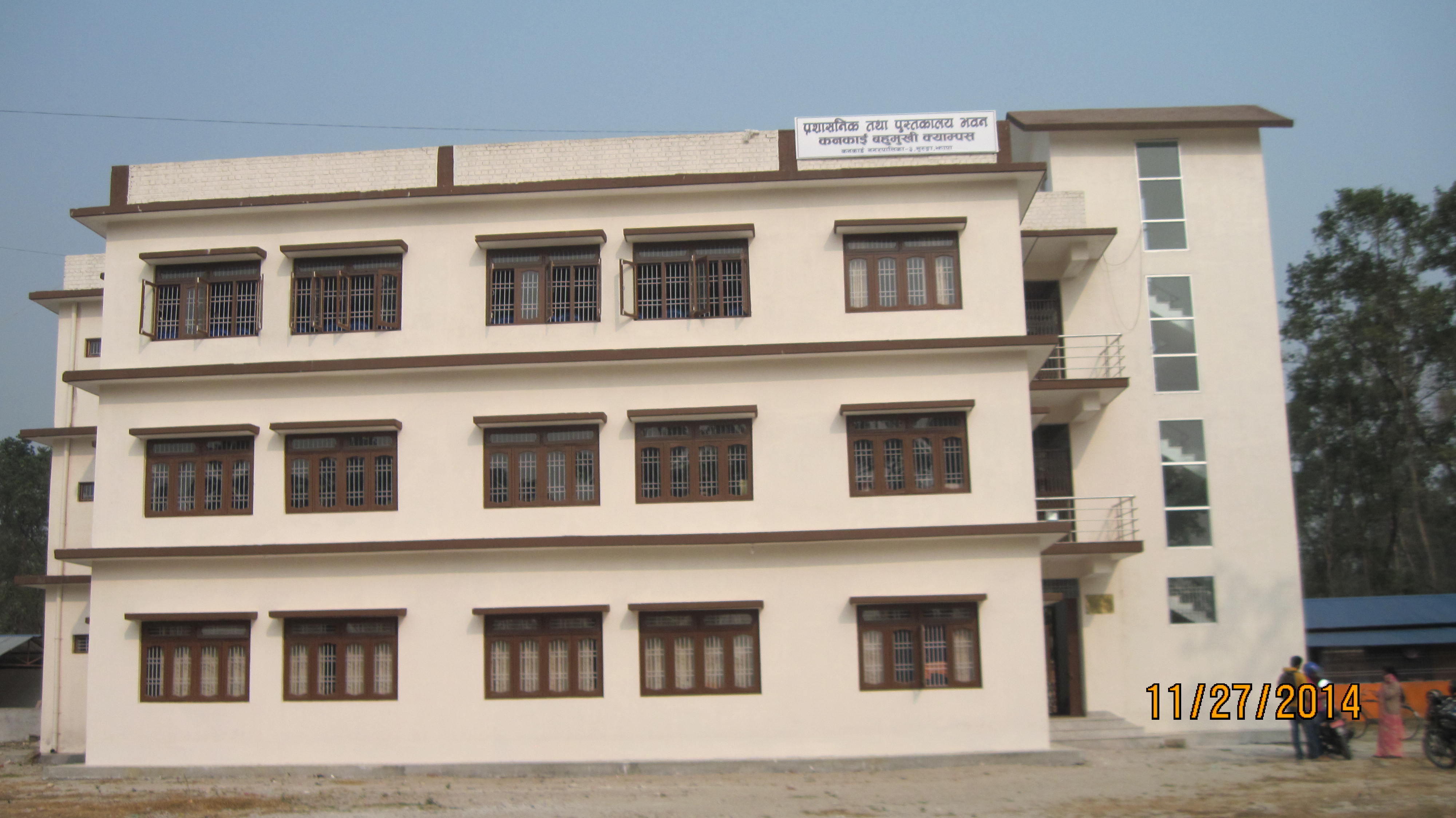 नेपाली: कनपा ३ सुरुङ्गा, झापास्थित कनकार्इ बहुमुखी क्याम्पसकाे प्रशासनिक भवन । यहाँ क्याम्पस प्रशासन र पुस्तकालय रहेकाे छ ।